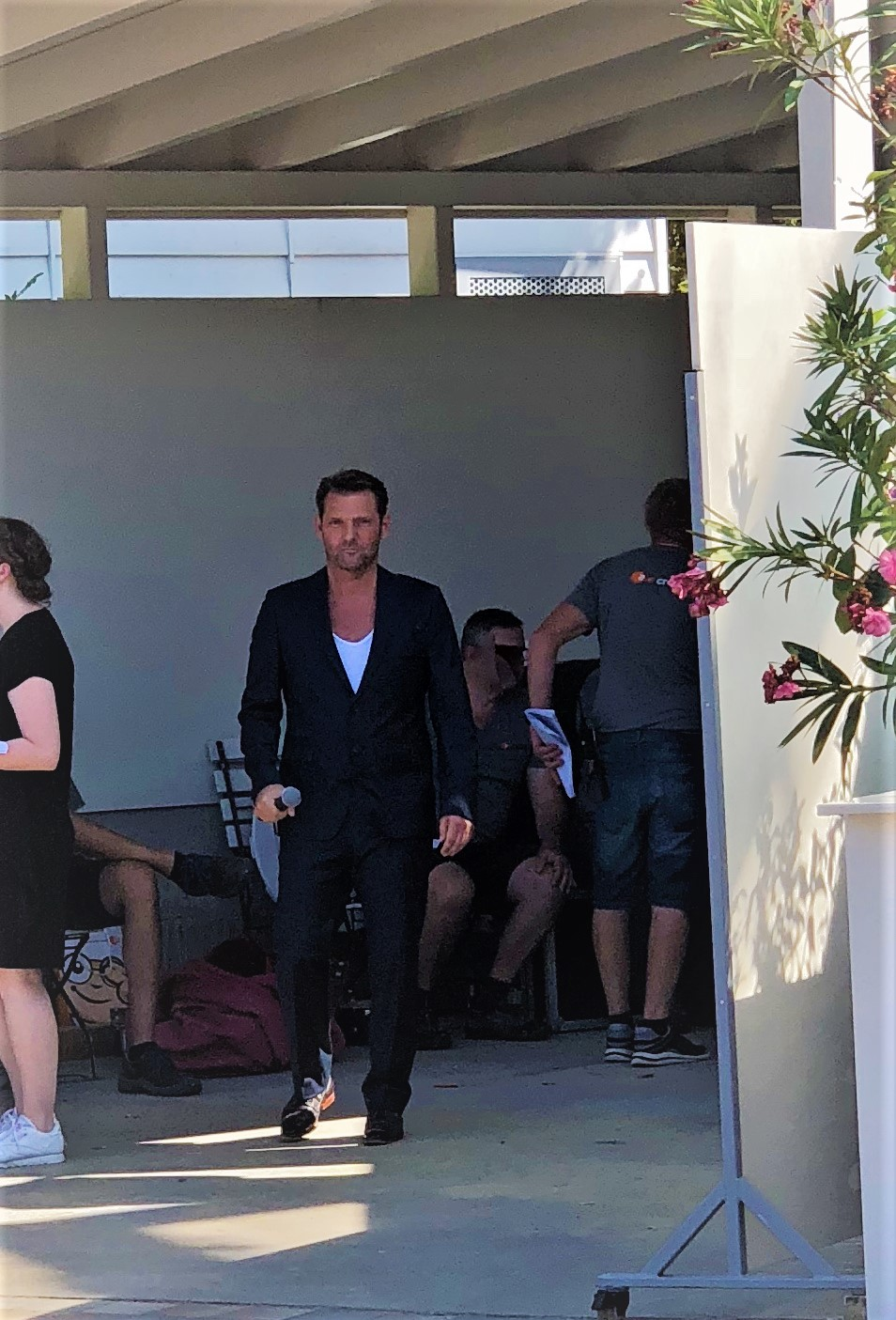 Detlef kurz vor seinem Auftritt beim ZDF Fernsehgarten am 19.08.2018 in Mainz